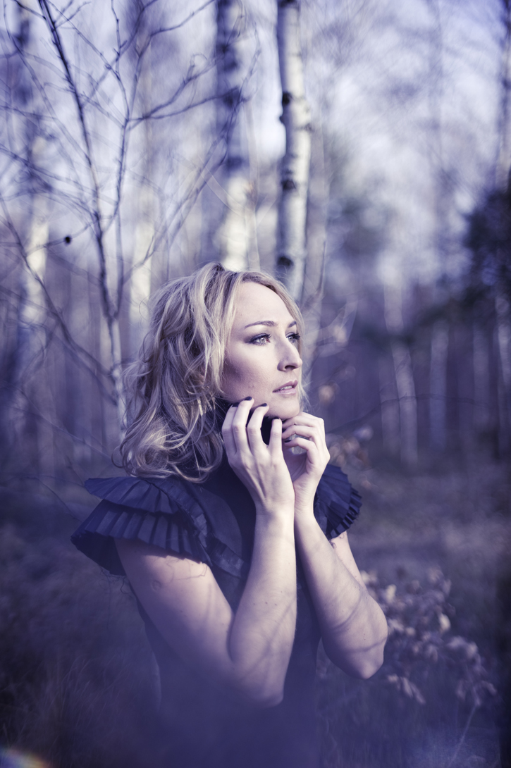 Anita Lipnicka